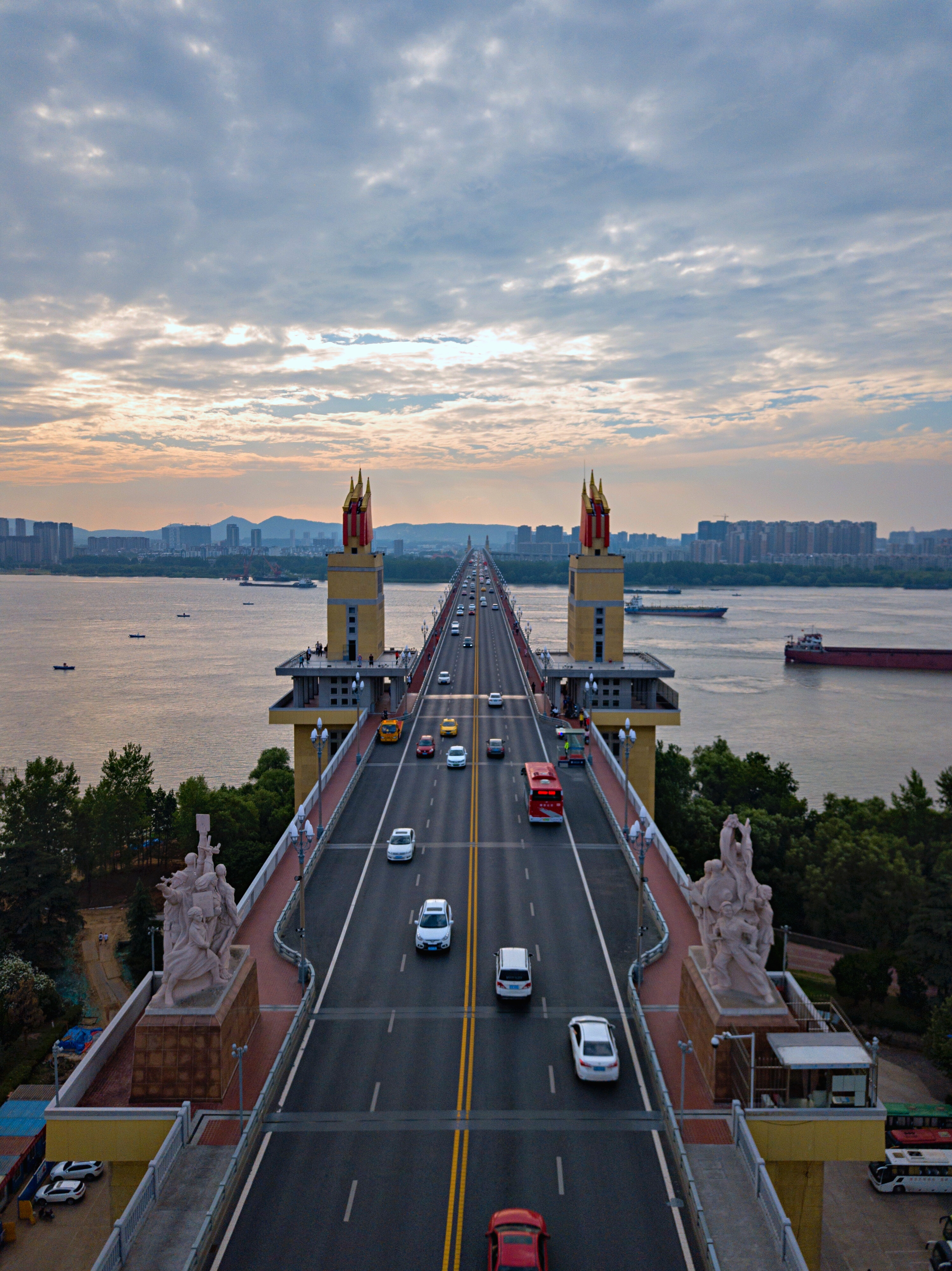 中文（中国大陆）: 南京长江大桥